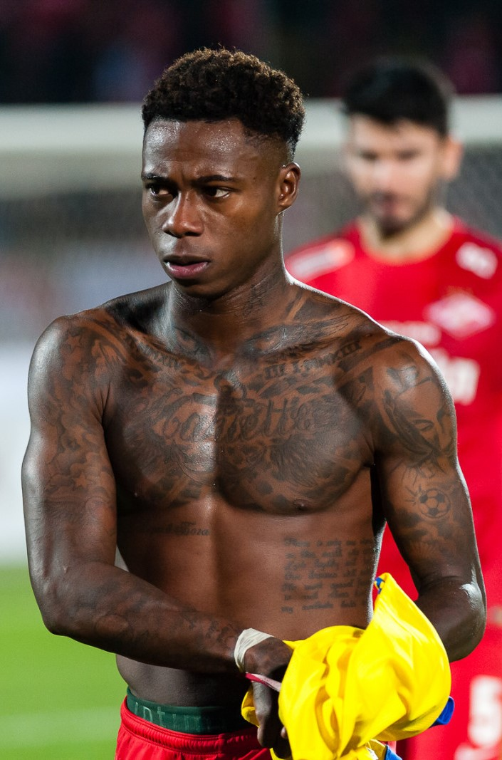 Quincy Promes